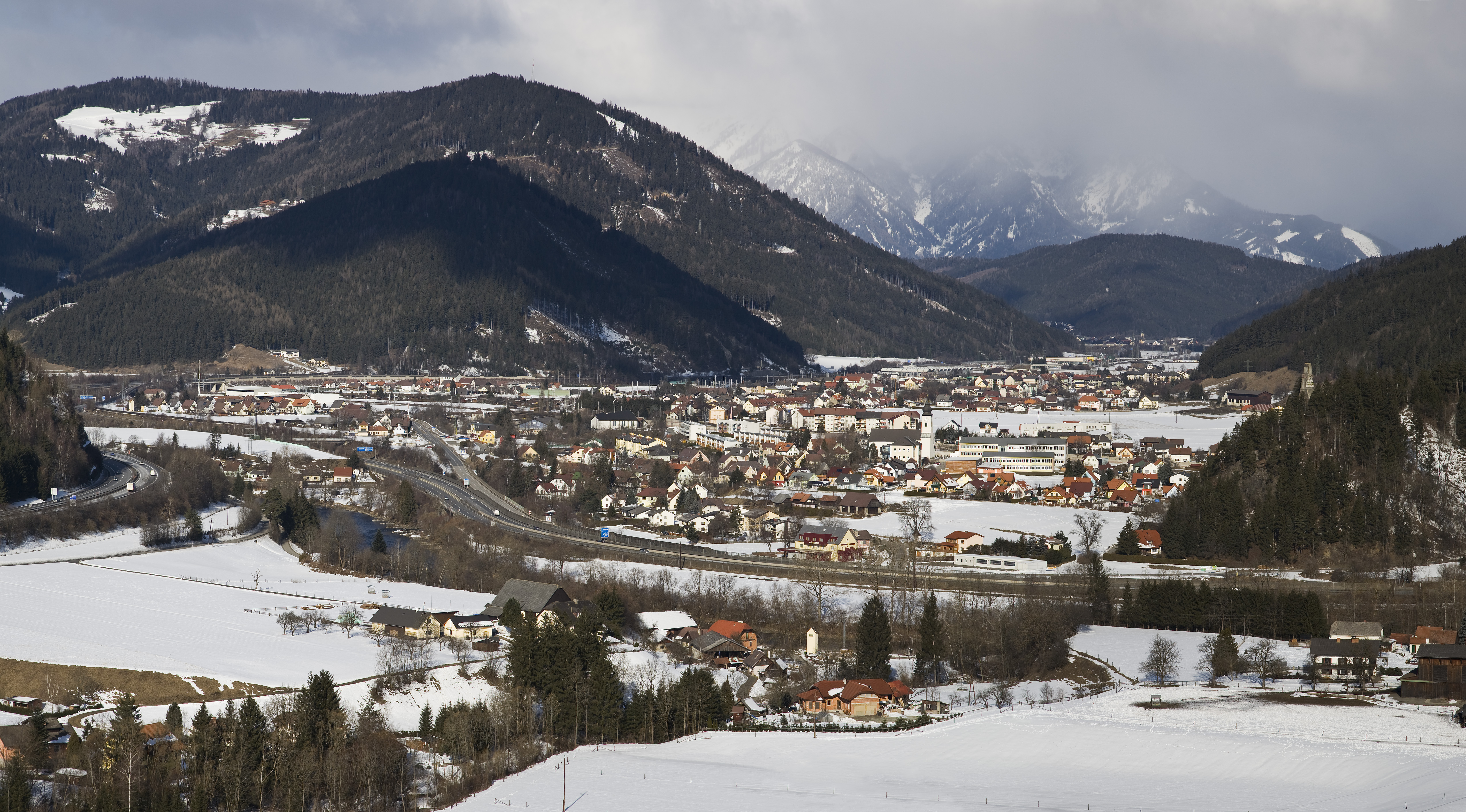 Blick auf Sankt Michael in Obersteiermark vom Flaterberg. Das Bild zeigt den Ort von Süden.